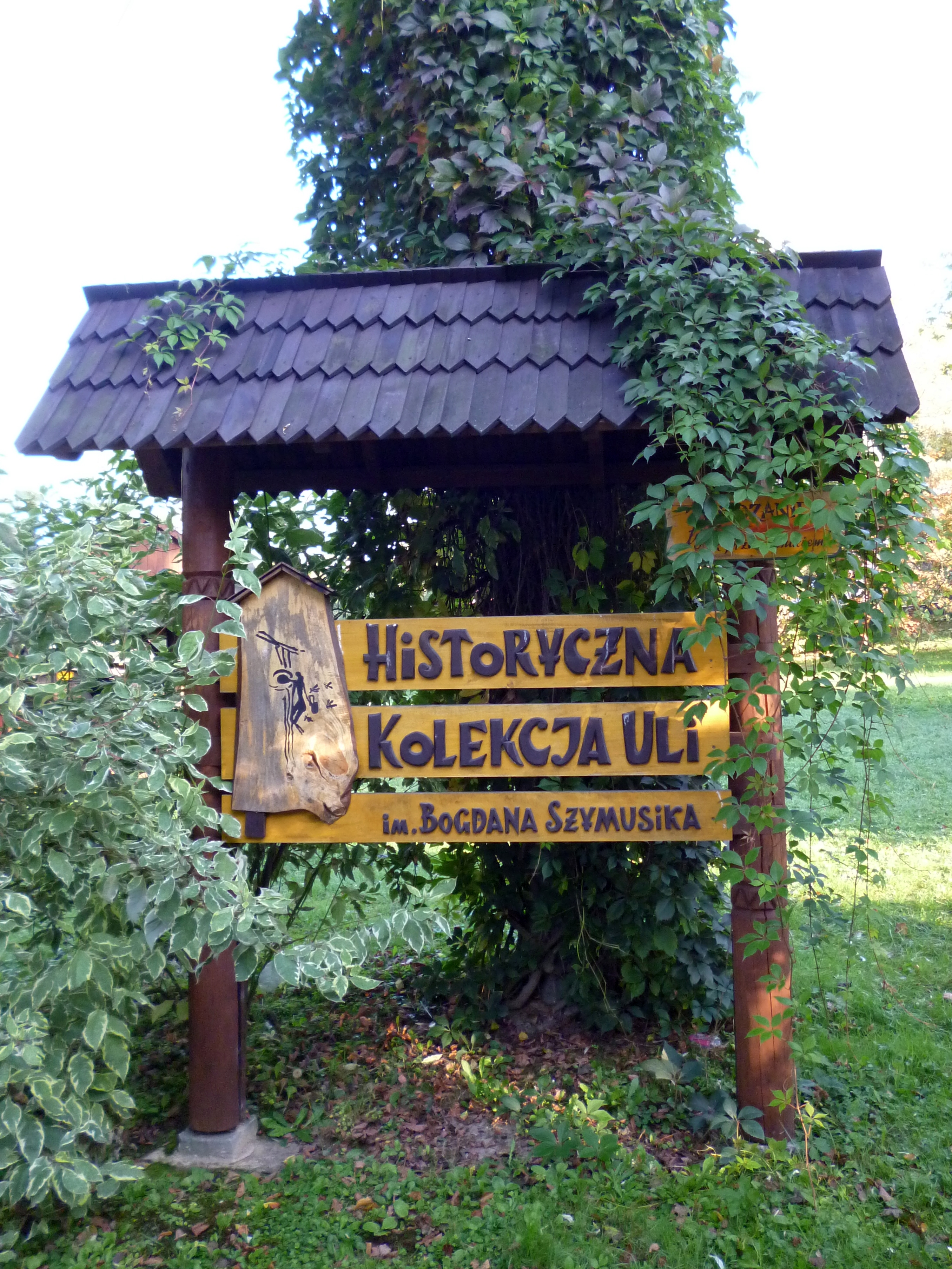 Bogdan Szymusik, pszczelarz, kolekcjoner zabytkowych uli, weteran Armii Krajowej, porucznik Sił Zbrojnych III RP. Muzeum Pszczelarstwa w Stróżach nosi imię Bogdana Szymusika.